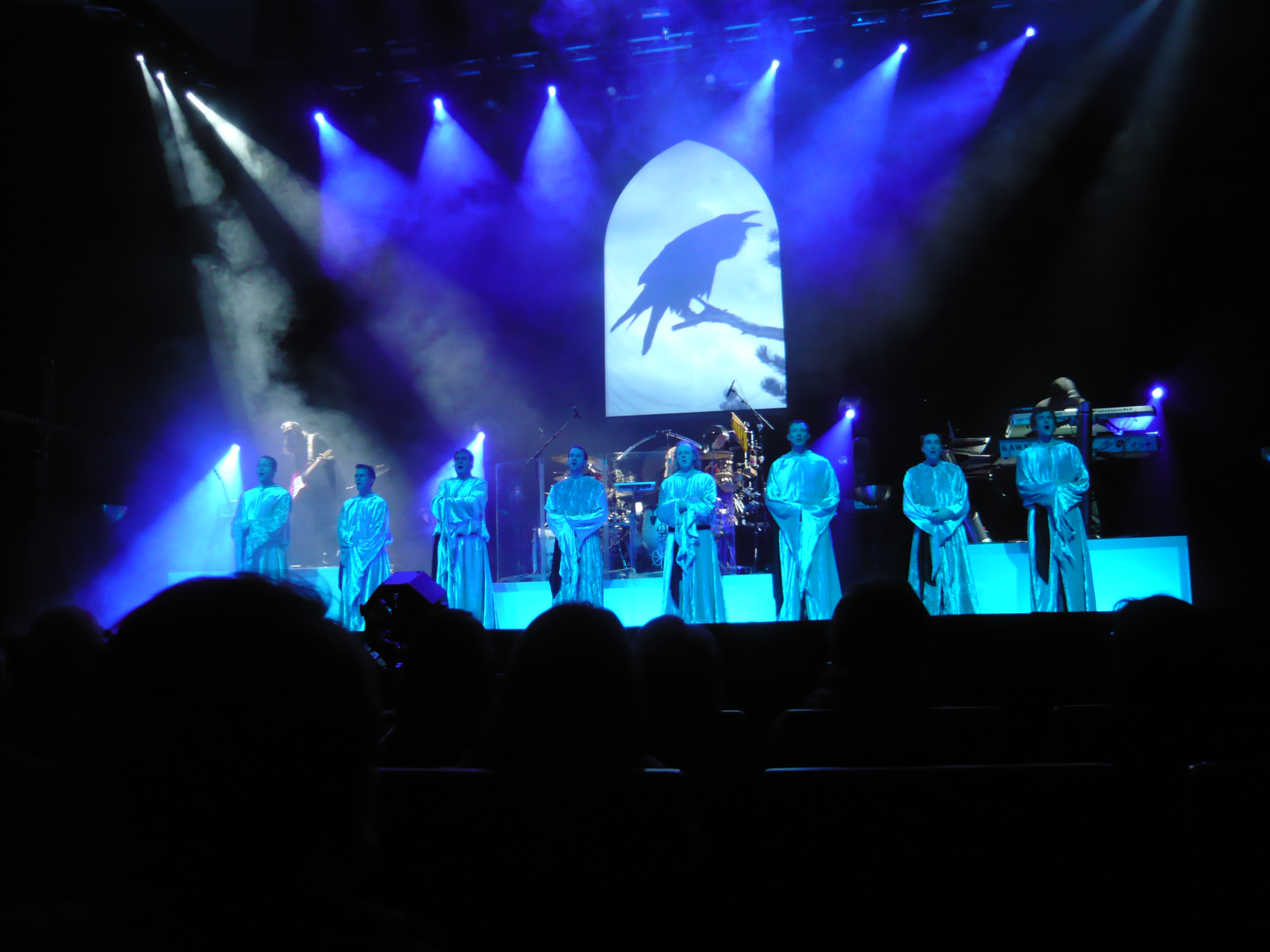 Gregorian und Amelia Brightman live im Konzerthaus Freiburg